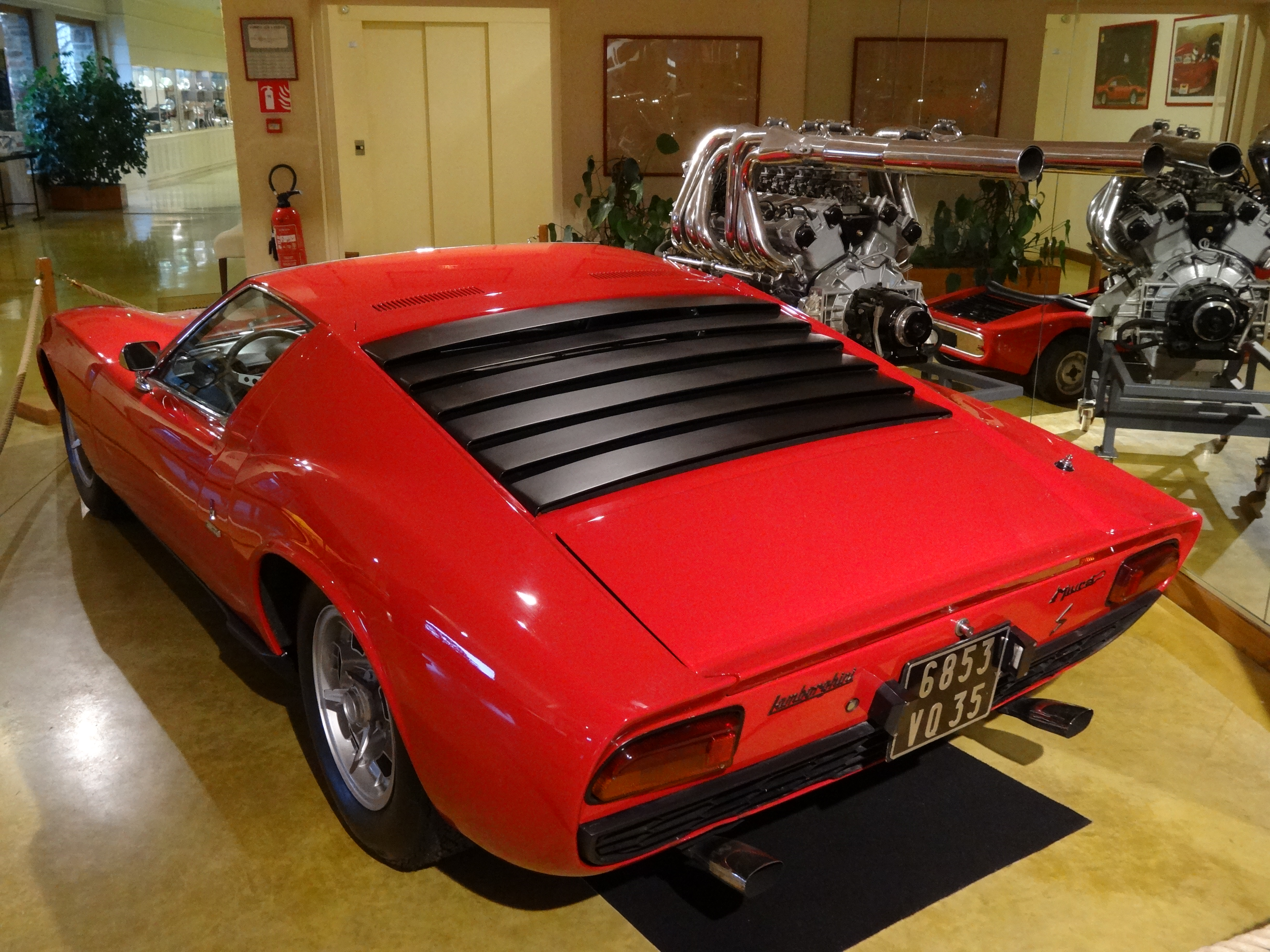 P400 S 140 exemplaires du 12 décembre 1968 au 12 mars 1972 3 929 cm³, 370 ch à 7 700 tr/min, 285 km/h, 1 180 kg, pneus Pirelli Cinturato GR 70 VR-15HS Entre 100 et 550 000e en 2013